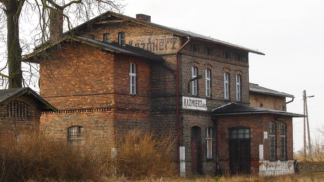 stacja kolejowa - widok na północny-zachód